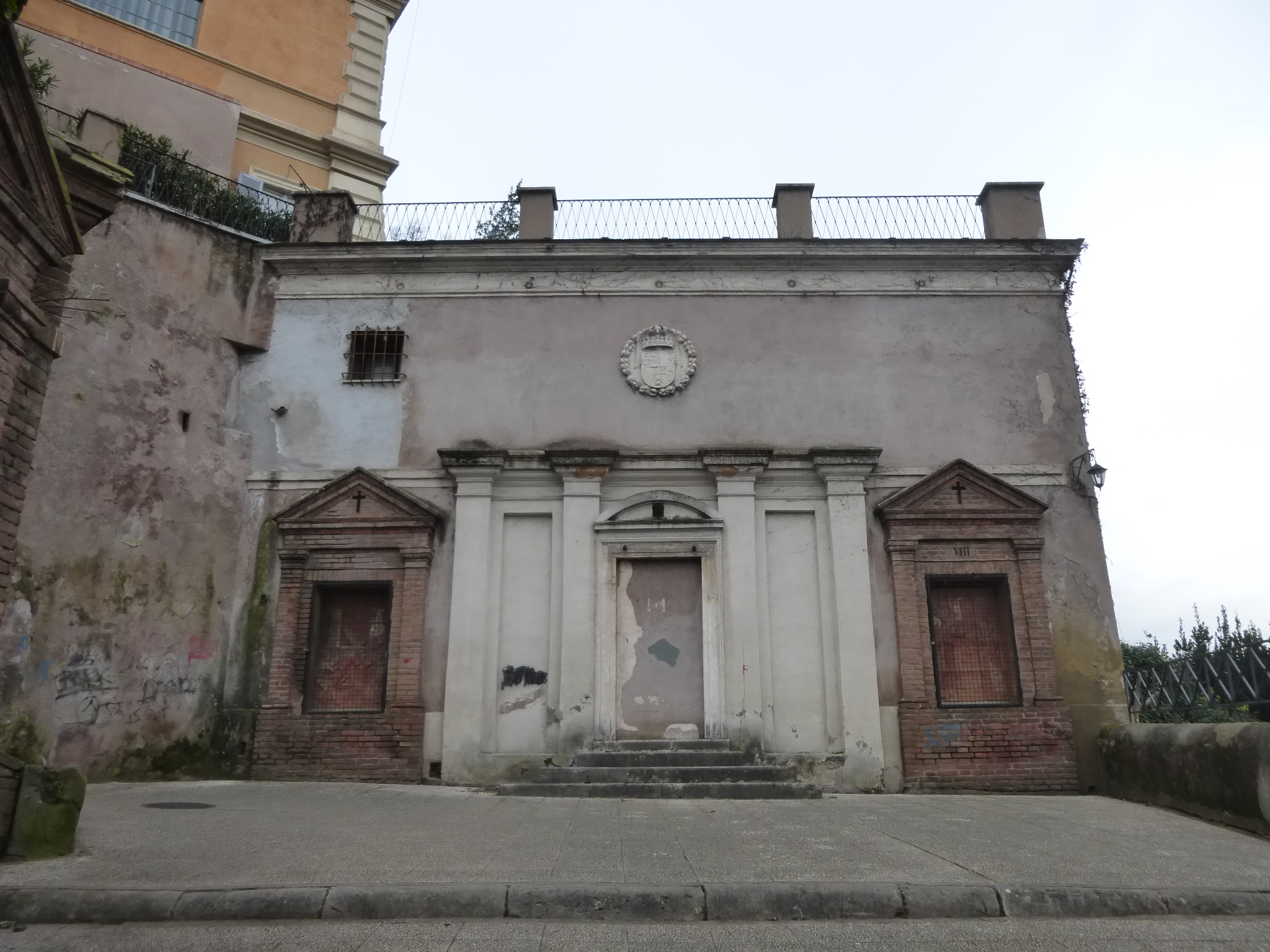 Roma, via di S. Pietro in Montorio. Salita della Via Crucis spagnola, stazioni VIII e IX e ingresso ora murato.